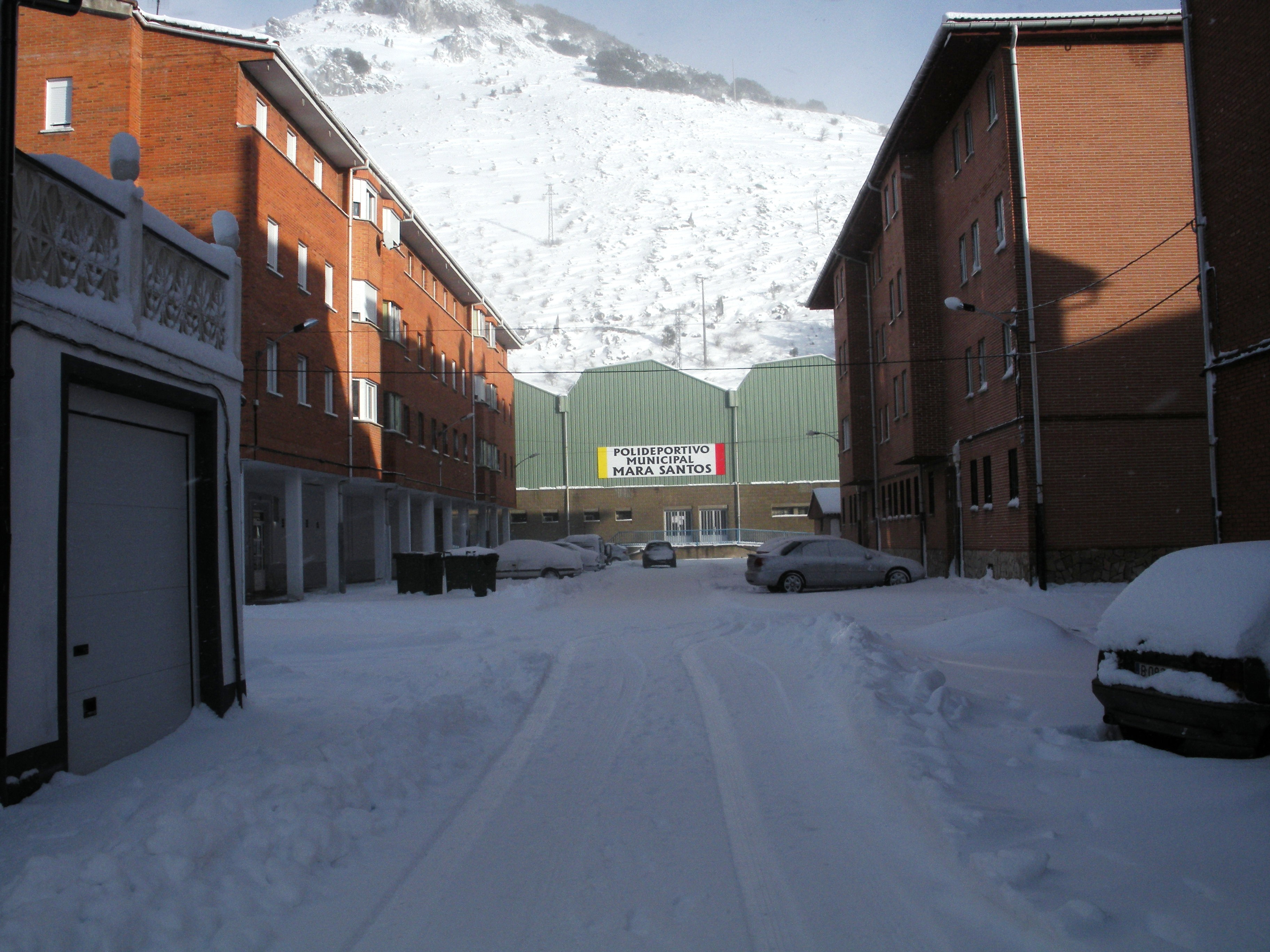 Vista de una calle de Velilla del Río Carrión (España) tras una nevada.